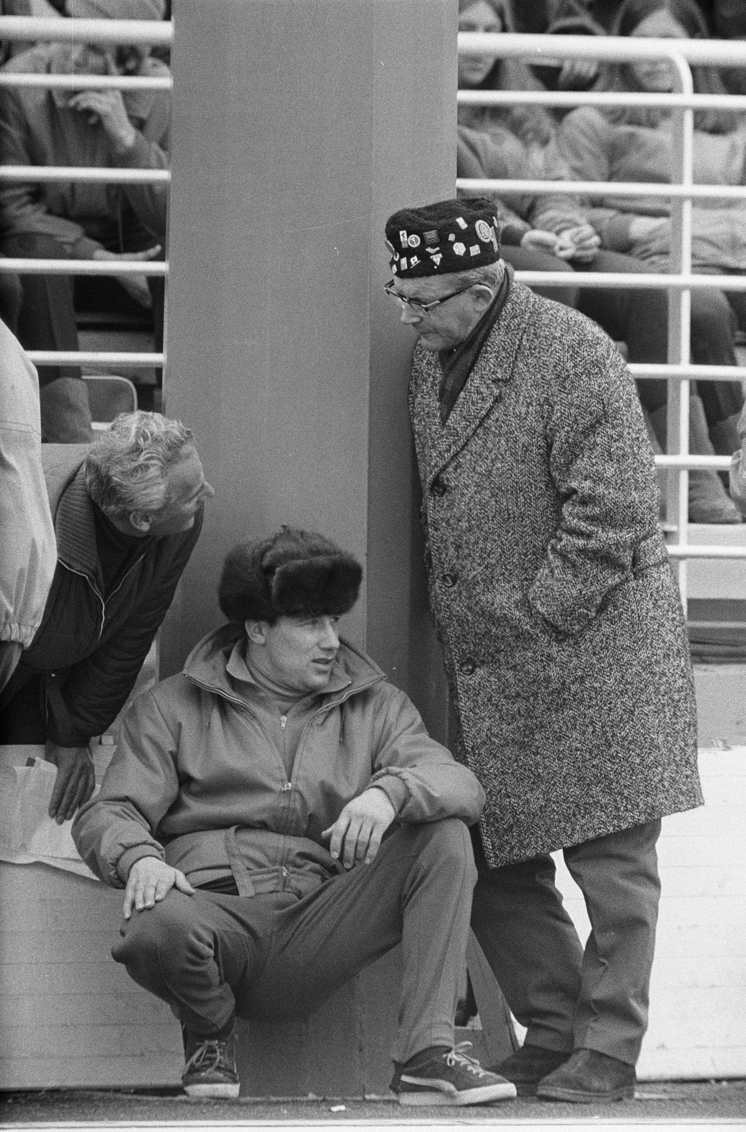 Collectie / Archief : Fotocollectie Anefo Reportage / Serie : [ onbekend ] Beschrijving : Olympische Winterspelen te Grenoble. Kees Verkerk met zijn vader na zijn rit op de 5000 meter. Datum : 15 februari 1968 Locatie : Grenoble Trefwoorden : schaatsen, sport Persoonsnaam : Verkerk, Kees Instellingsnaam : Olympische Winterspelen Fotograaf : Kroon, Ron / Anefo Auteursrechthebbende : Nationaal Archief Materiaalsoort : Negatief (zwart/wit) Nummer archiefinventaris : bekijk toegang 2.24.01.05 Bestanddeelnummer : 921-0863